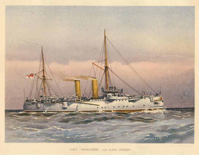 HMS Magicienne, 2nd Class Cruiser.